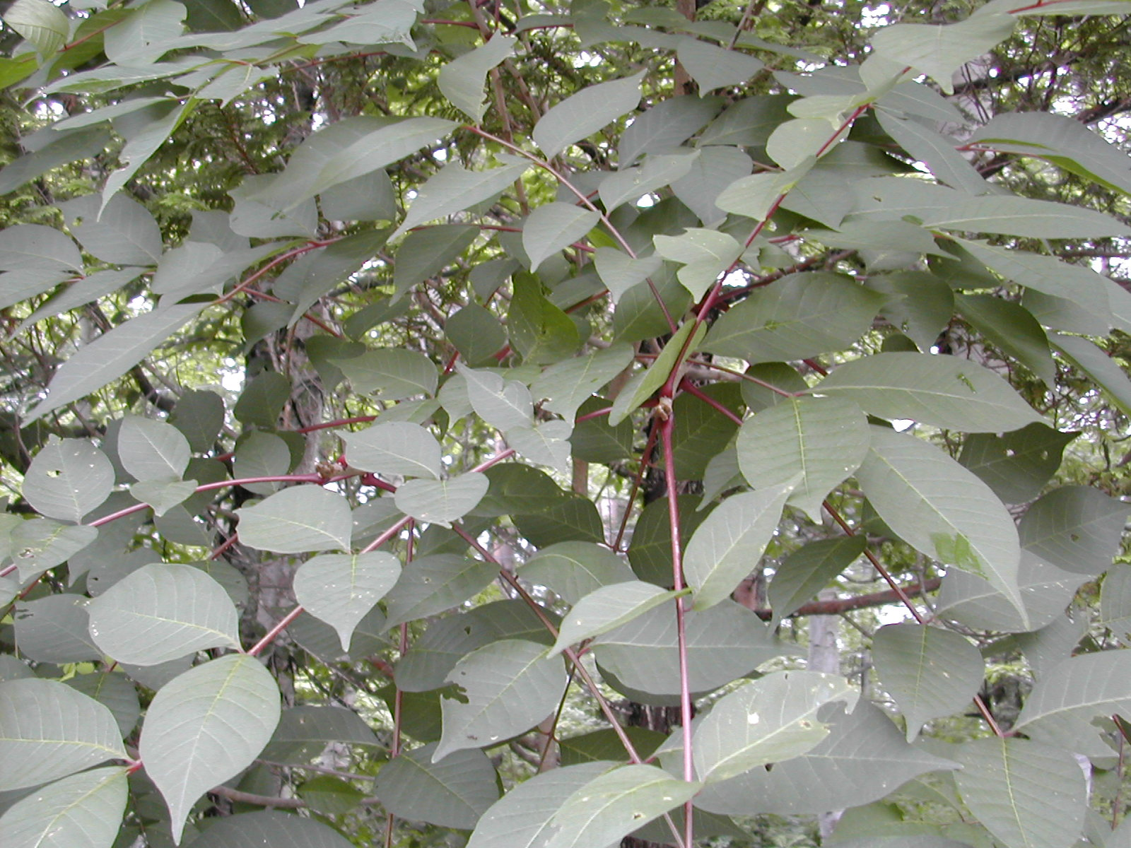 Toxicodendron vernicifluum